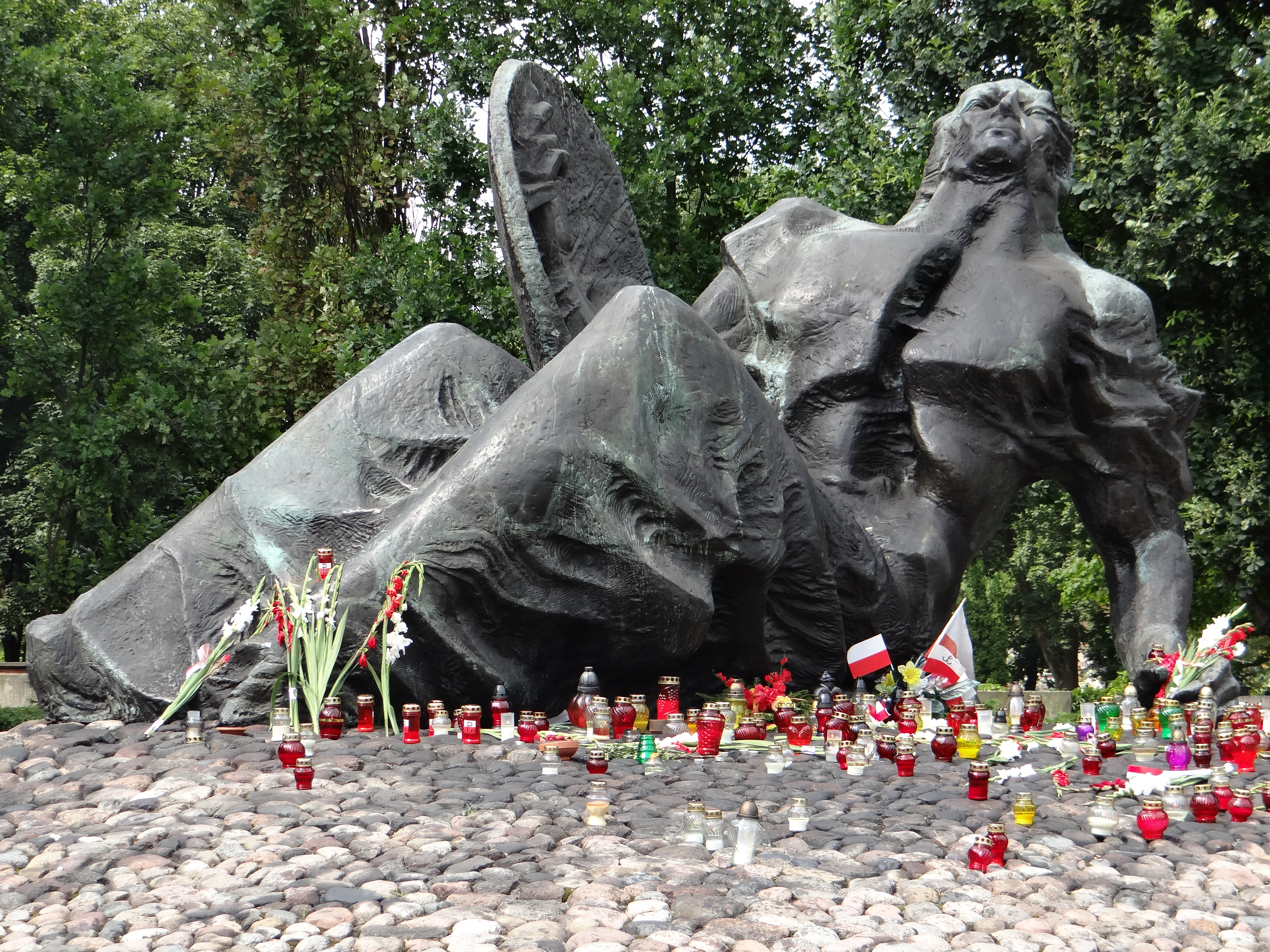 Pomnik "Polegli Niepokonani" - fragment